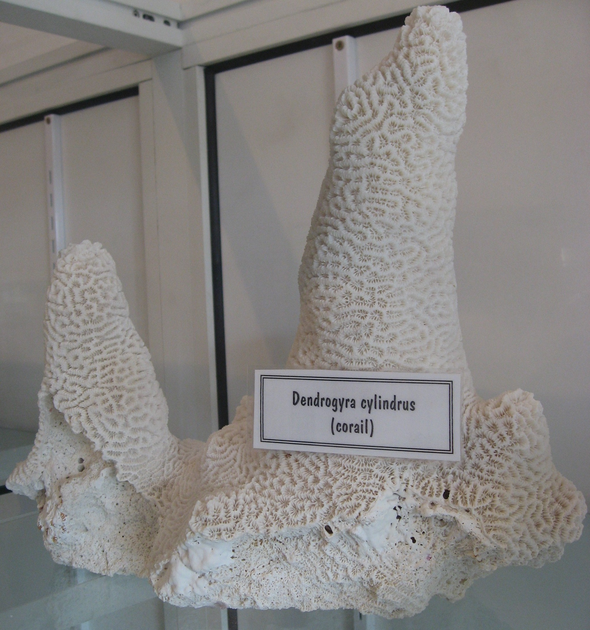 Dendrogyra cylindrus au Fort Napoléon en Guadeloupe, îlet Terre de haut-de-haut l'archipel Saintes